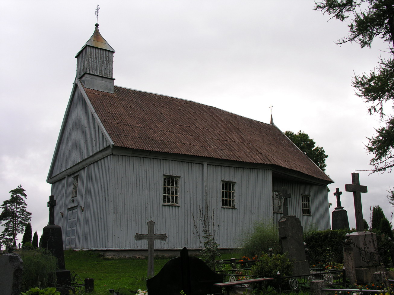 Grūstės koplyčia, Mažeikių raj., 2005 m. Fotografavo: Algirdas, 2005 m. rugpjūčio 14 d.